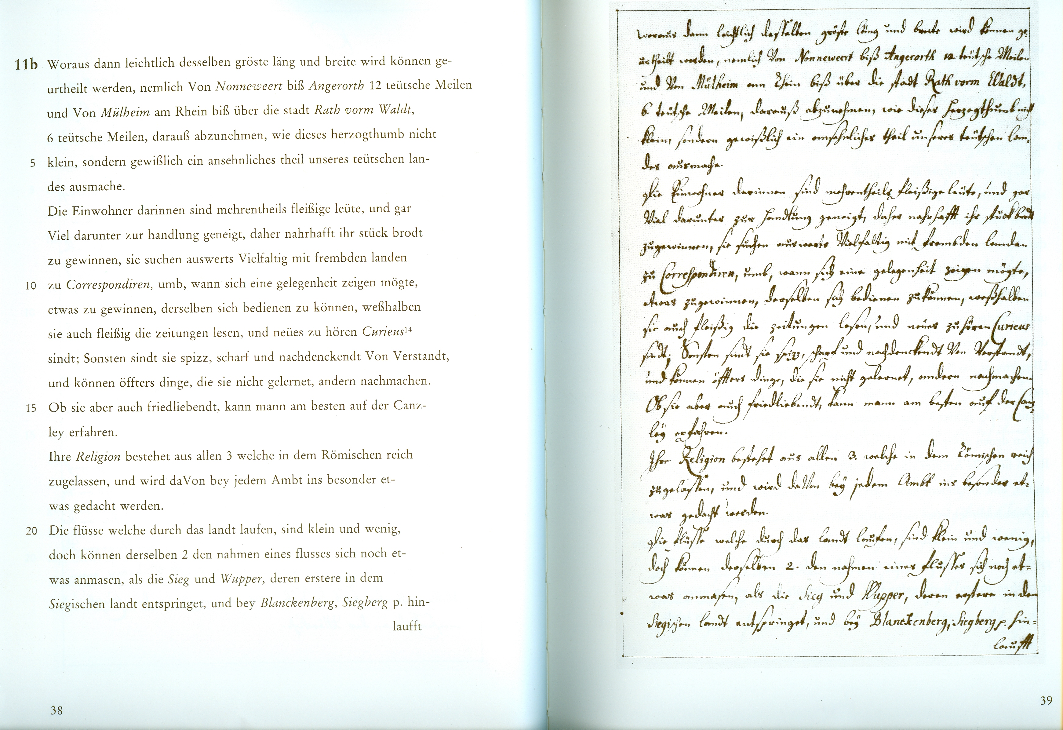 Erich Philipp Ploennies: Topographia Ducatus Montani (1715), S. 39 Herausgegeben und bearbeitet von Burkhard Dietz (1988) (Abschrift auf Seite 38 ohne Schöpfunghöhe) 1. Teil: Beschreibung des Landes, ISBN=3-87707-073-6